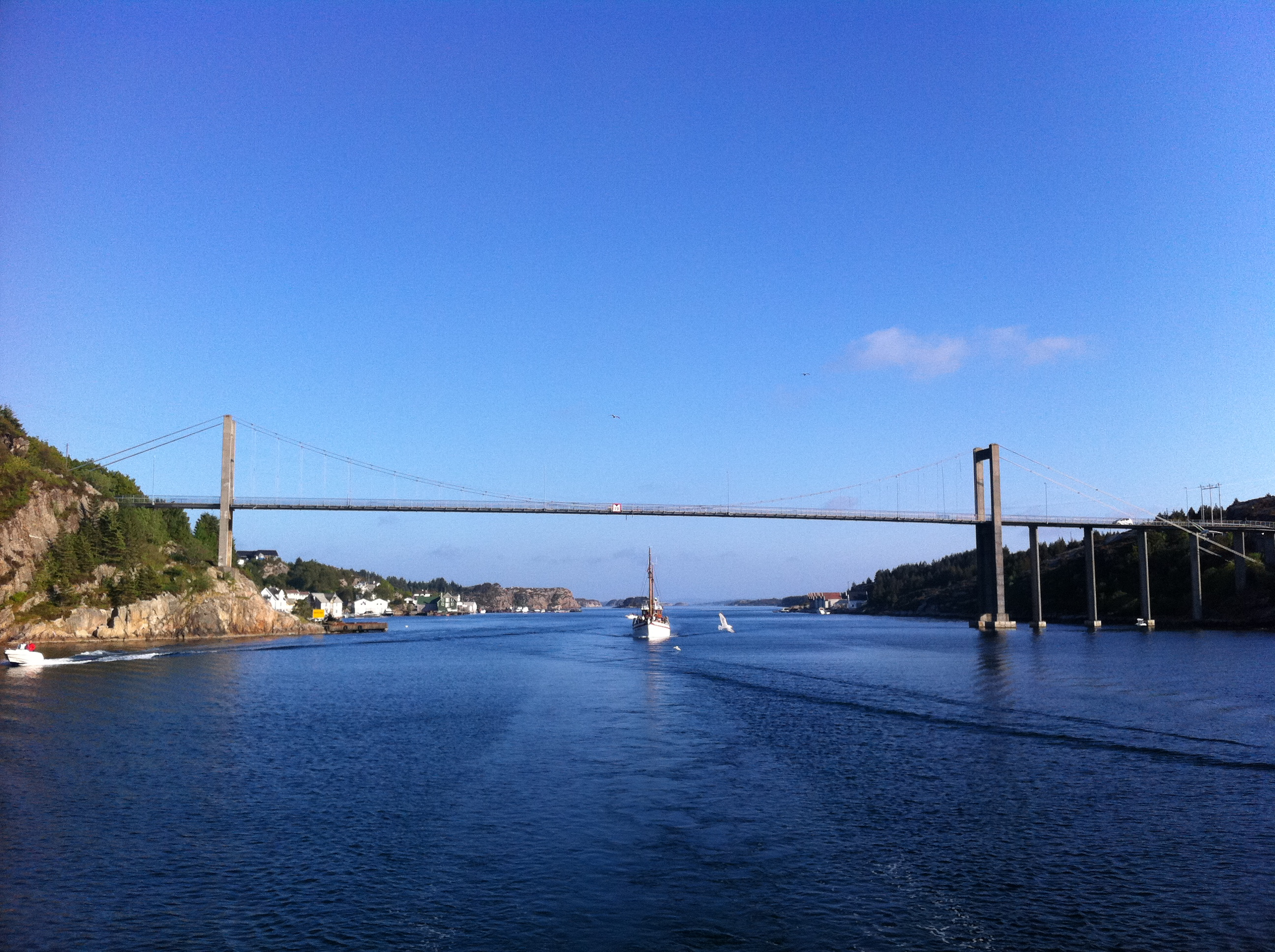 Tofterøybrua sett fra sjøen (fra nord)